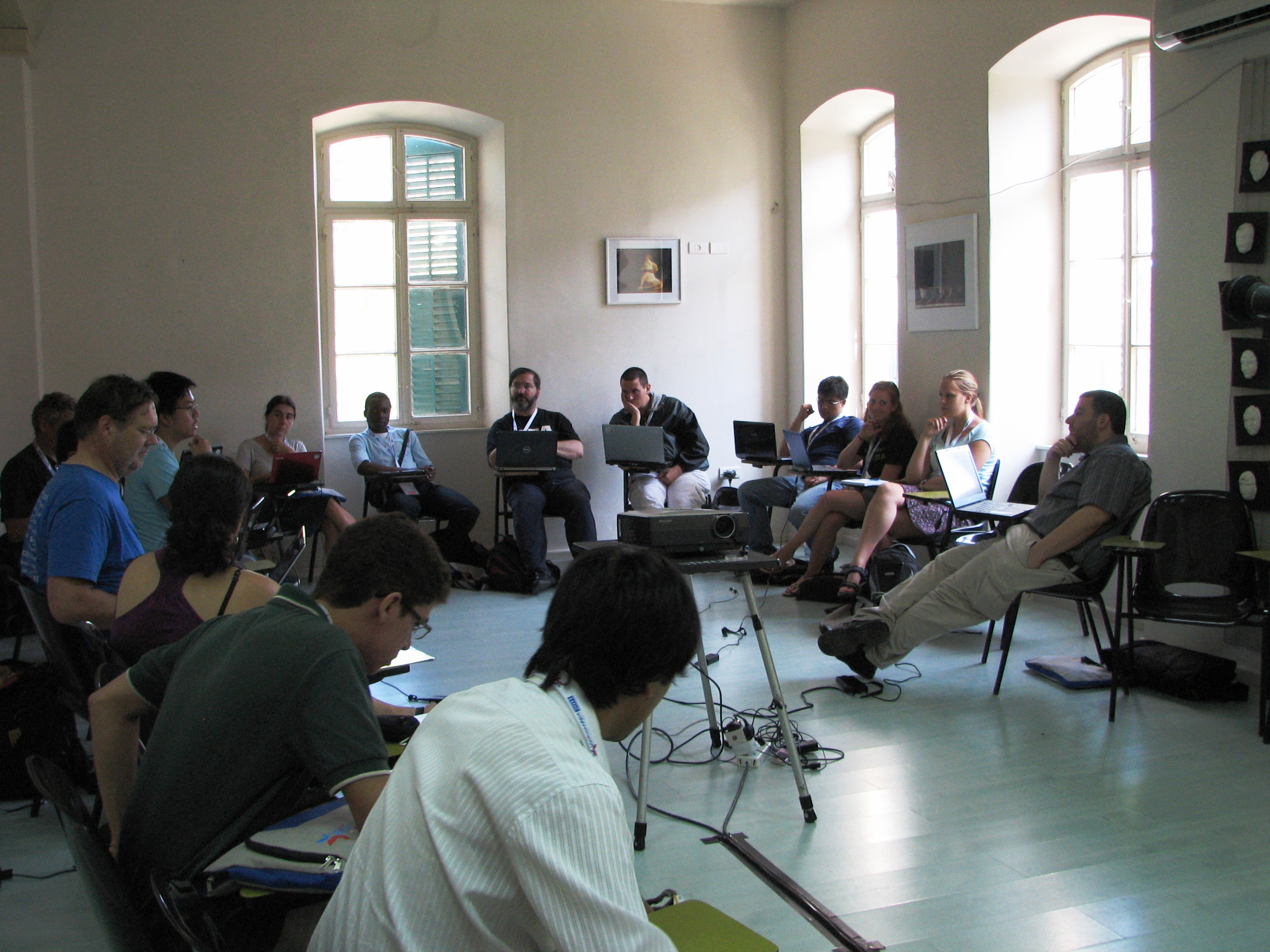 Wikimania 2011 Hackathon - Developer Days first day. כנס המפתחים ביום שלישי ורביעי בחיפה, הידועים גם בשם „האקאתון”. בכנס דנים, בין היתר, בנושא יצירת עורך ויזואלי לוויקיפדיה. כלומר, עורך שבו לא יצטרכו להשתמש בכל מיני קודים וסוגריים כדי לכתוב ערכים, אלא יוכלו לעשות את זה כמו במעבד תמלילים. דנים גם נושאים של שימוש בוויקיפדיה בטלפונים חכמים, נגישות לעיוורים, כתיבה מימין לשמאל, עזרים לעבודה עם מוזיאונים, שיפור תהליך העלאת התמונות ועוד תמונות מהיום הראשון